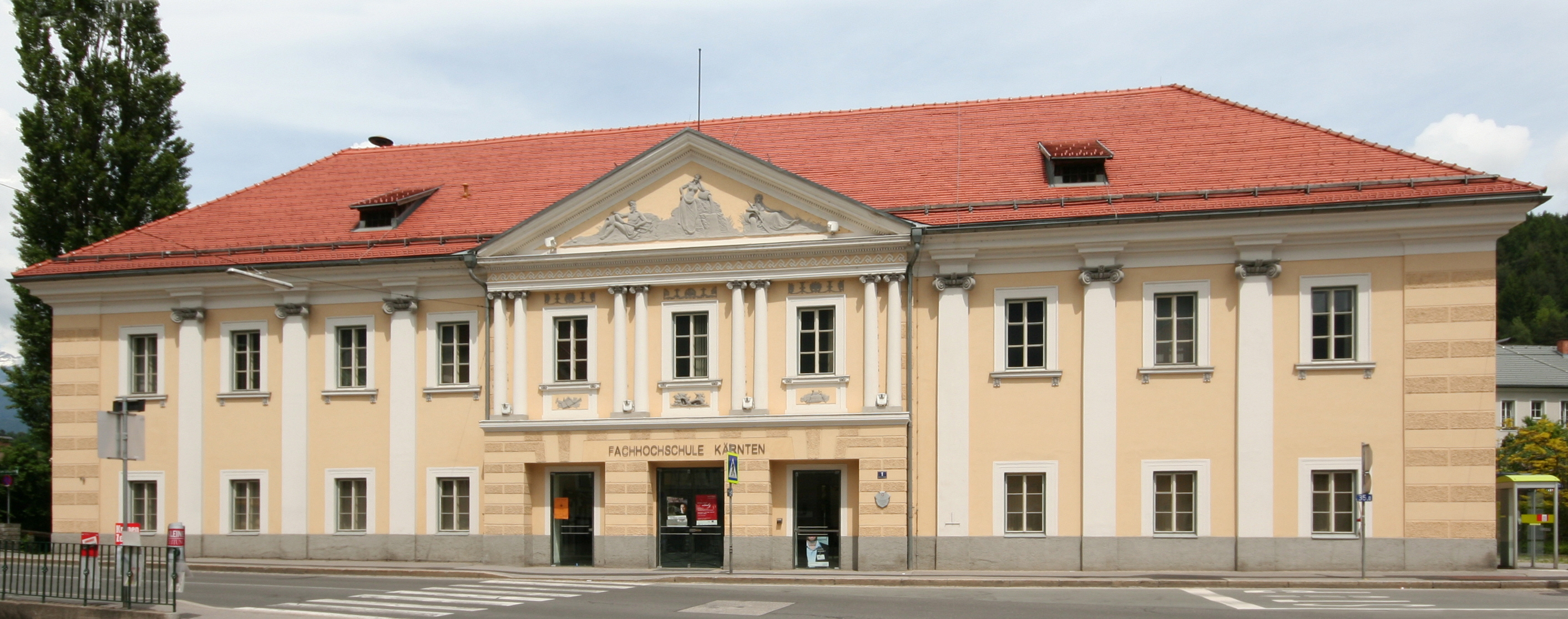 Spittl - Fachhochschule in Spittal an der Drau